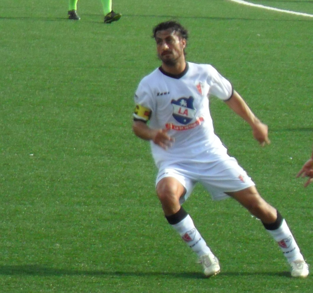 Francesco Scarpa durante Savoia - Paganese del 9 novembre 2014